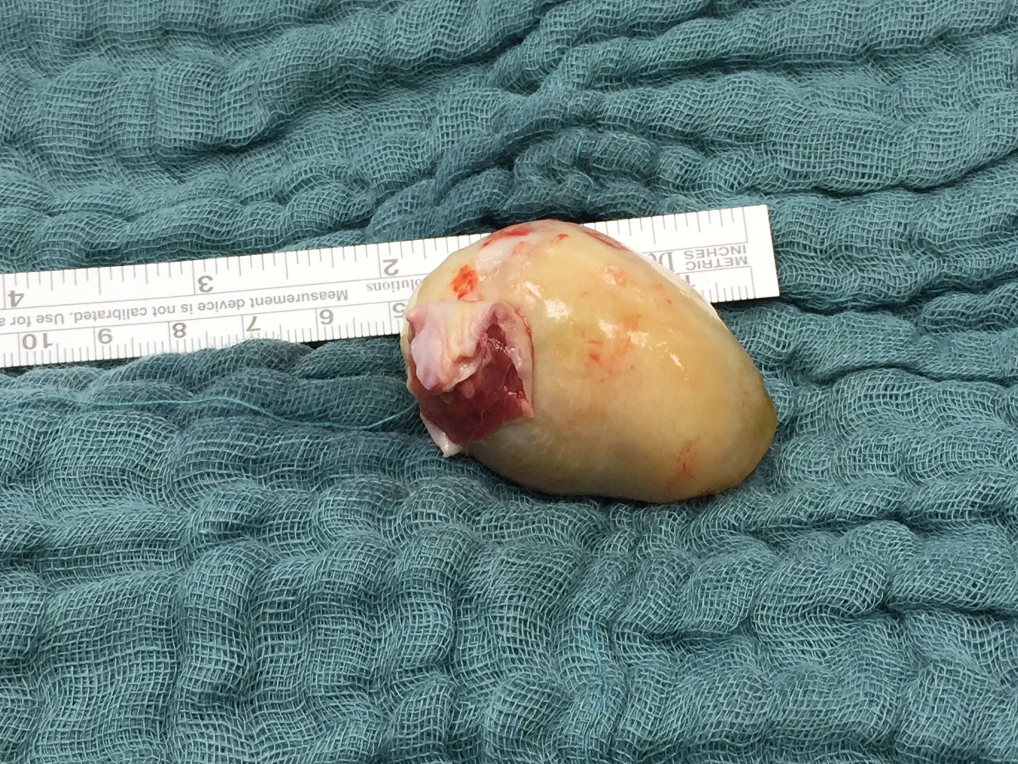 Myxom des rechten Atriums